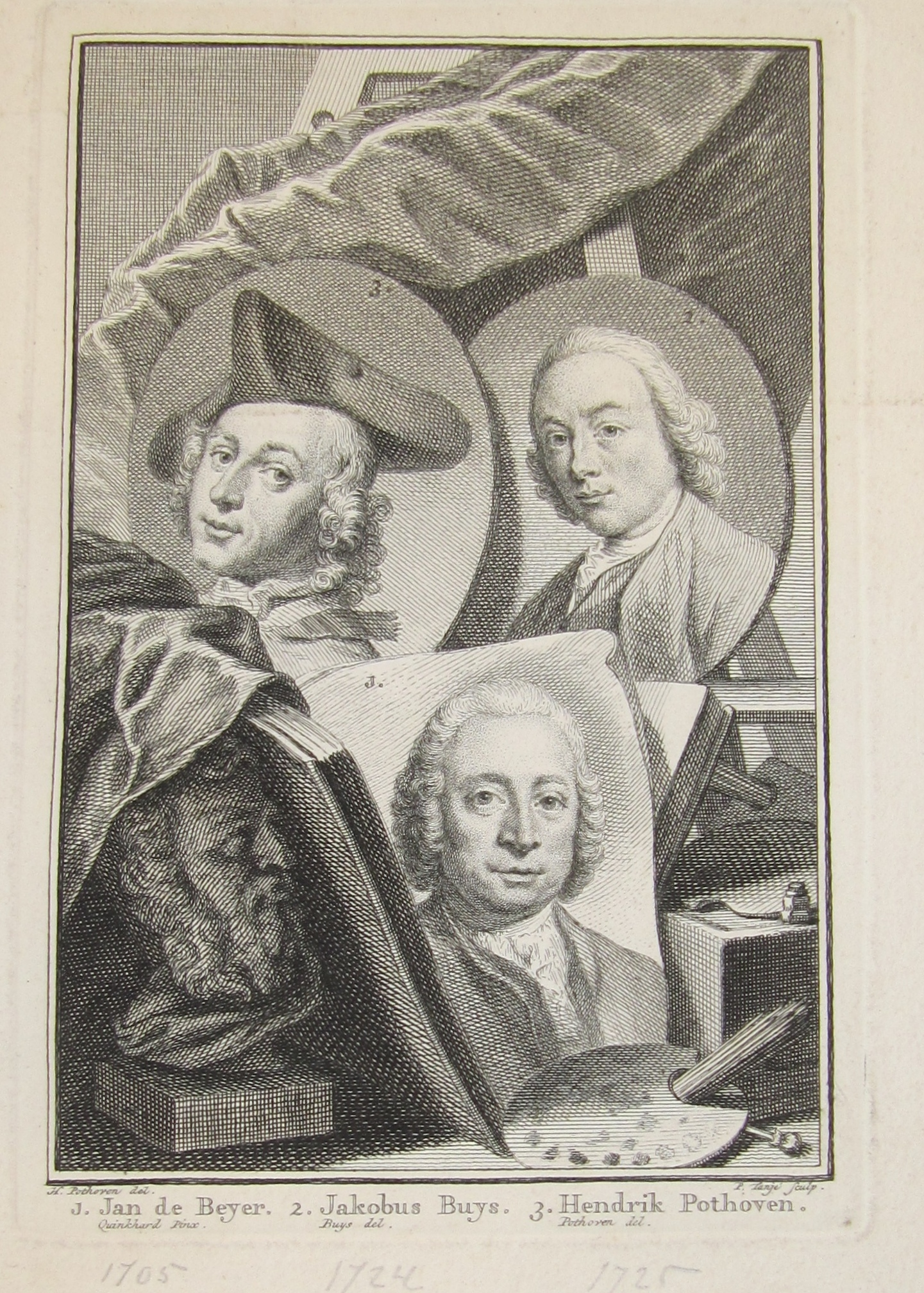 J. de Beyer 1703-1780, J. Buys 1724-1801, H. Pothoven 1725-1807